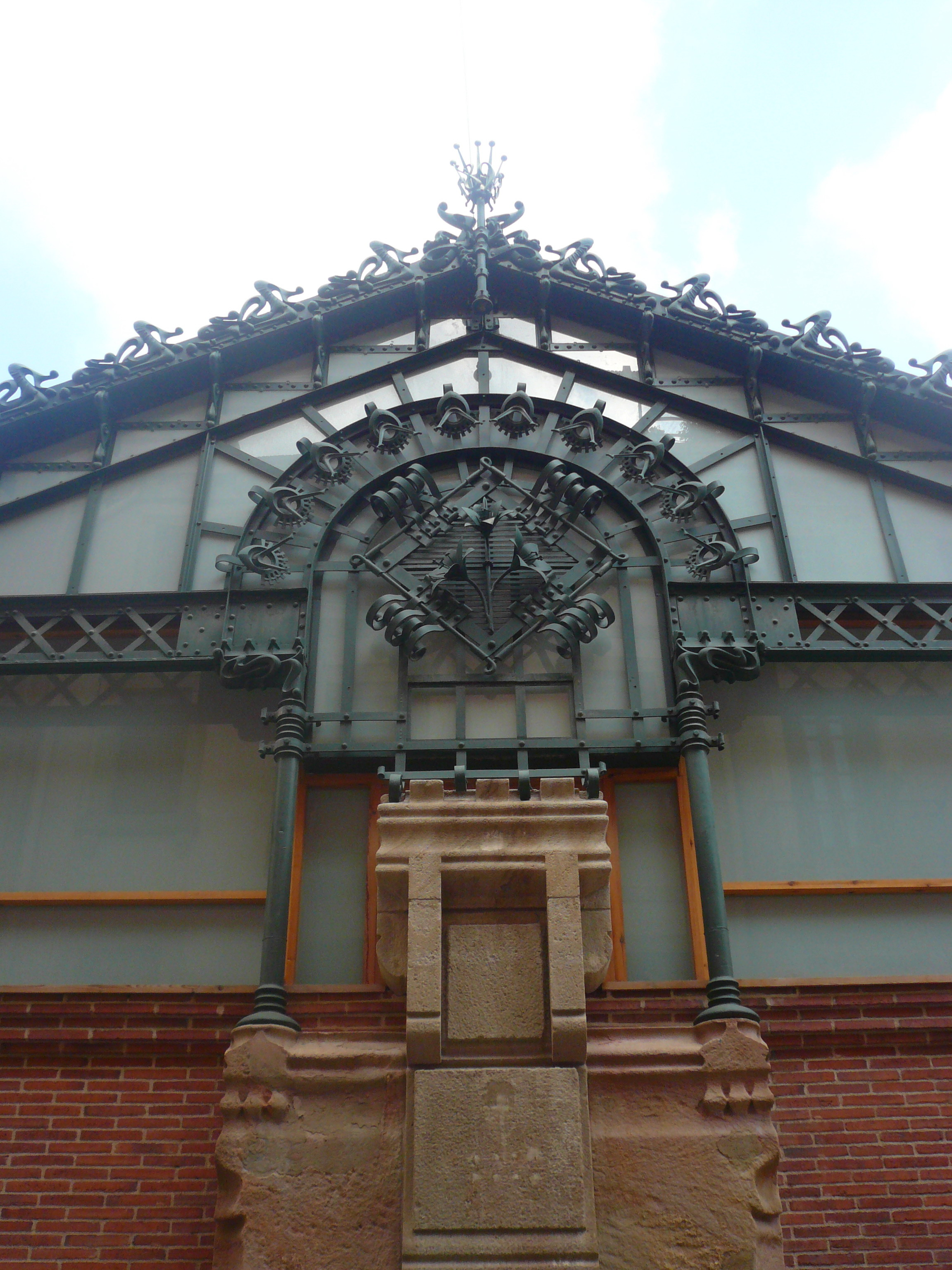 Mercat de la Llibertat (Barcelona)